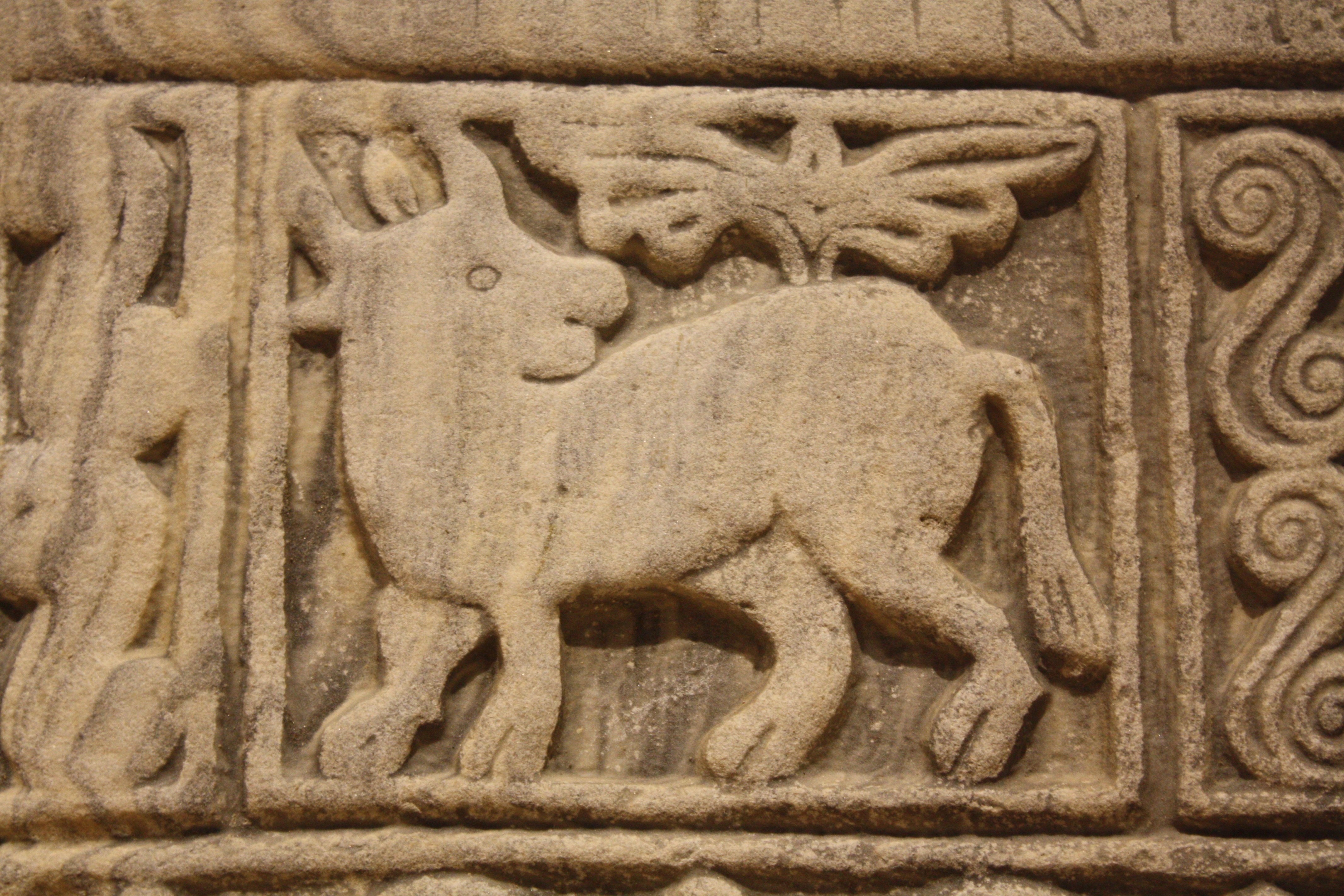 Relevo visigótico (séculos VI-VII) da igrexa de Santiago de Saamasas (Lugo), hoxe no Museo Catedralicio de Lugo.